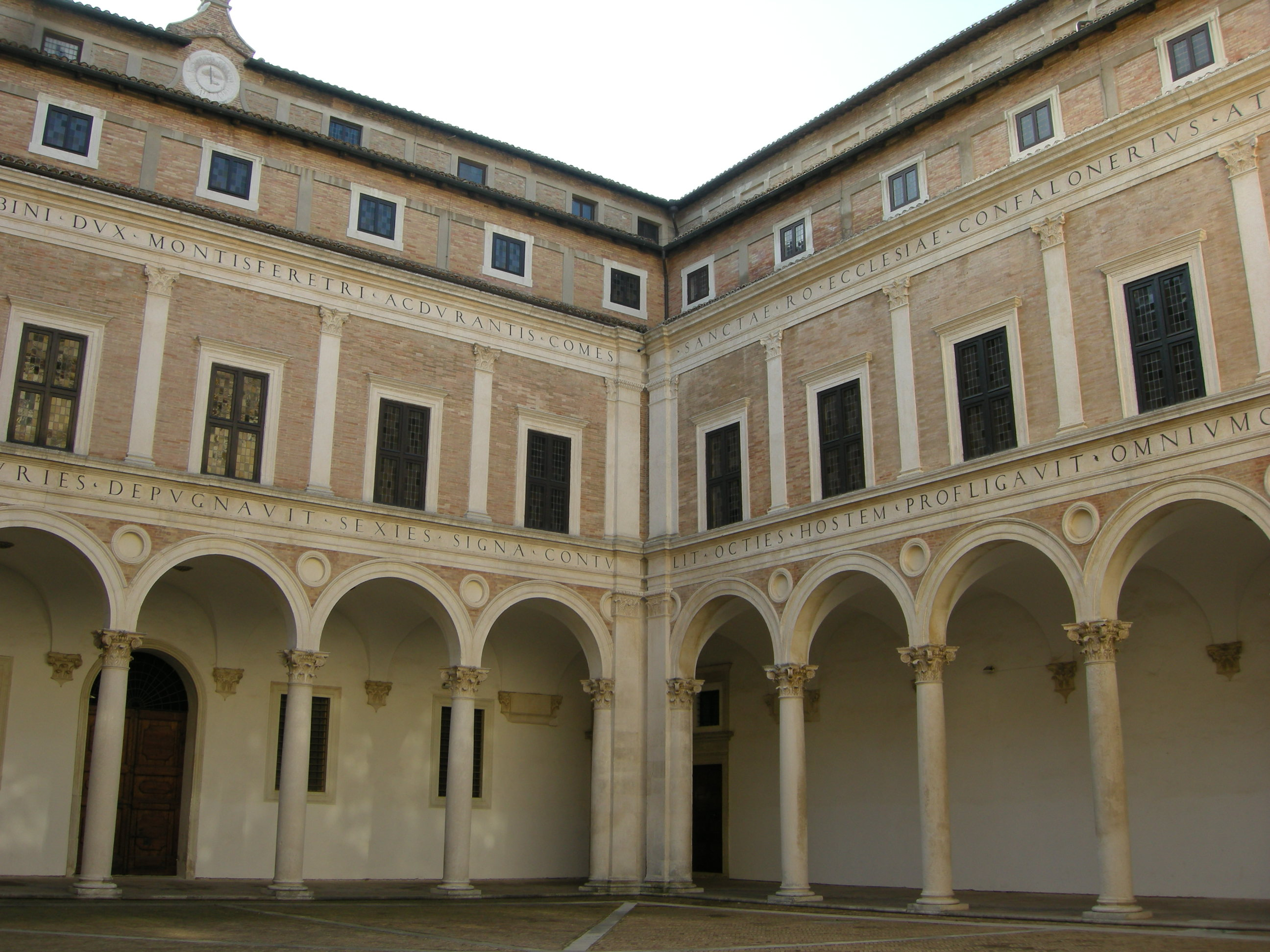 Cortile di palazzo ducale